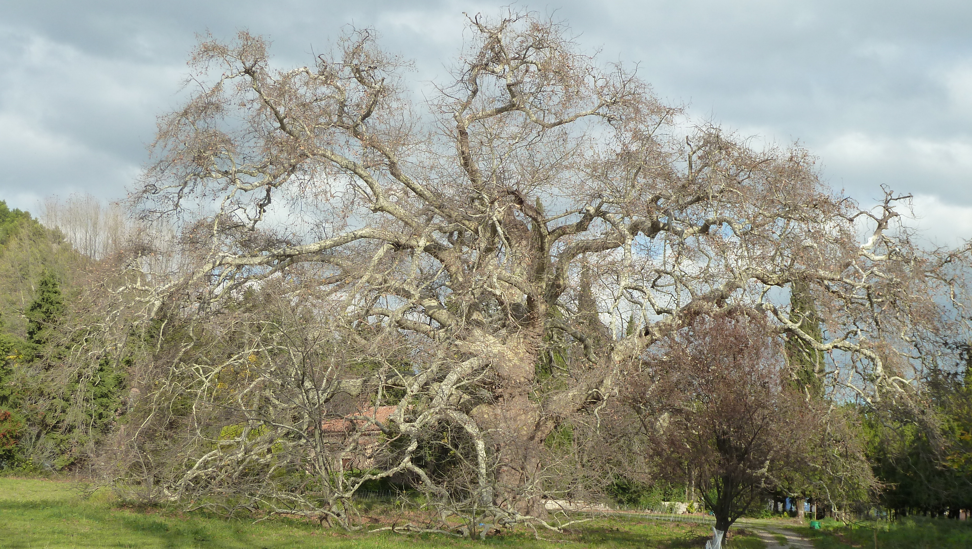 Le Géant de Provence, platane à Lamanon (13), environ 300 ans